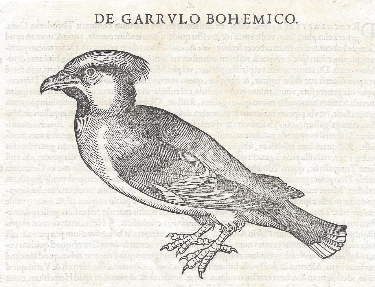 Der Seidenschwanz (Garrulum Bohemicum) Ausgabe 1585 in Conrad Gesners Vogelbuch (Erstveröff. 1551–1558)